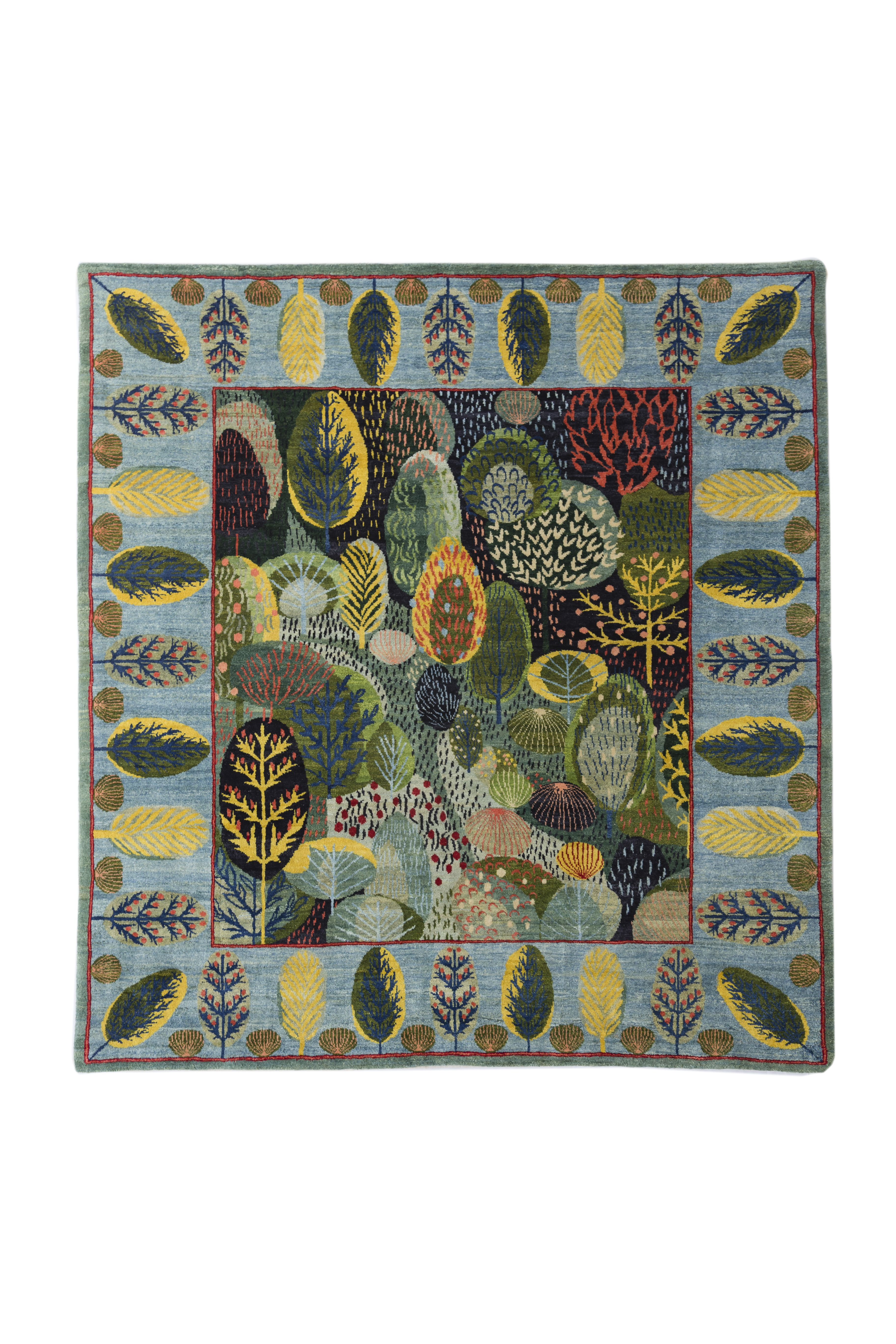 طرح مست از کلکسیون طبیعت